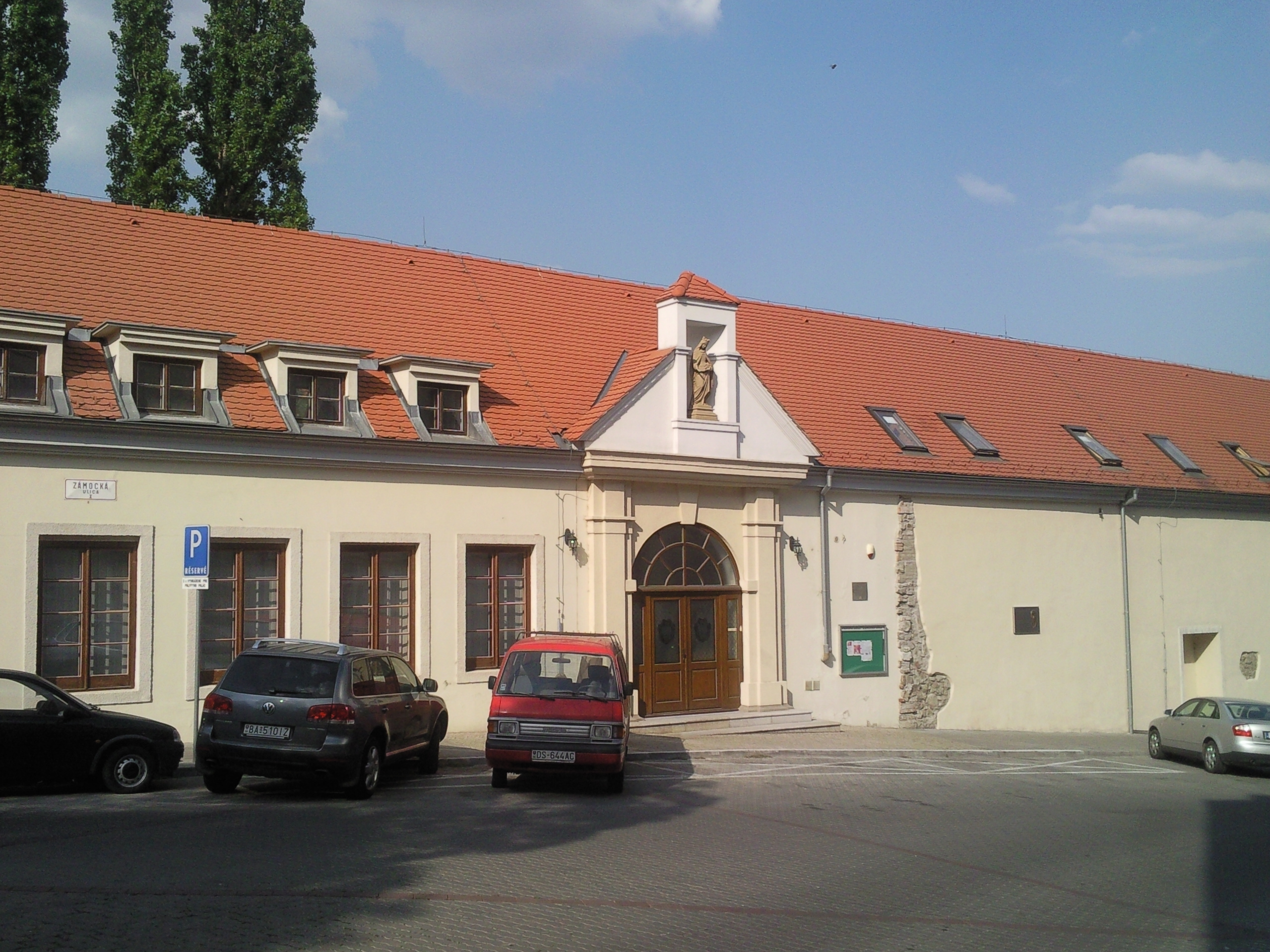 Pálfiho palác, Zámocká, Bratislava